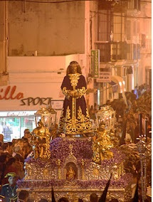 Medinaceli de Chiclana